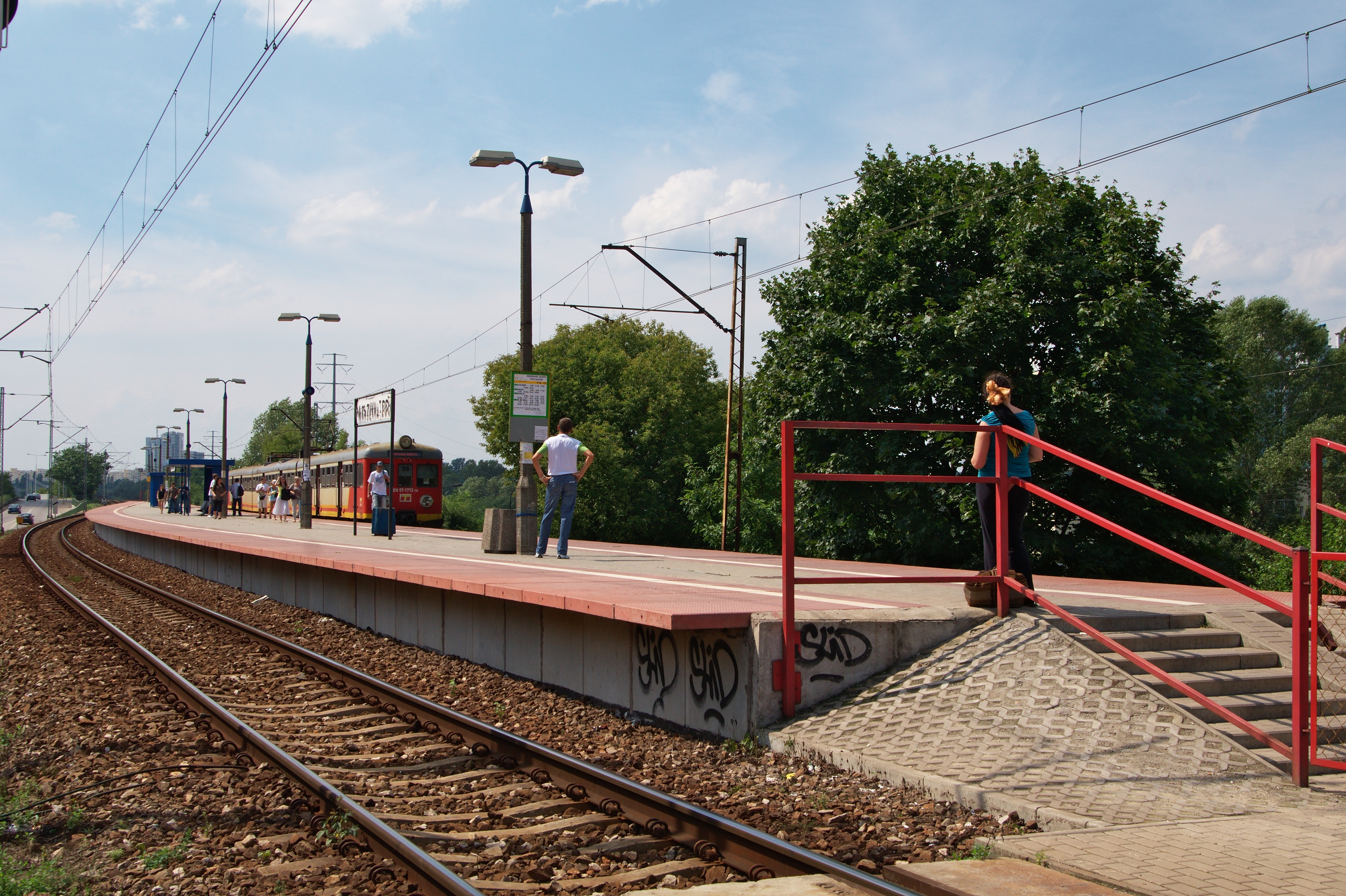 Przystanek kolejowy „Warszawa Zoo”.